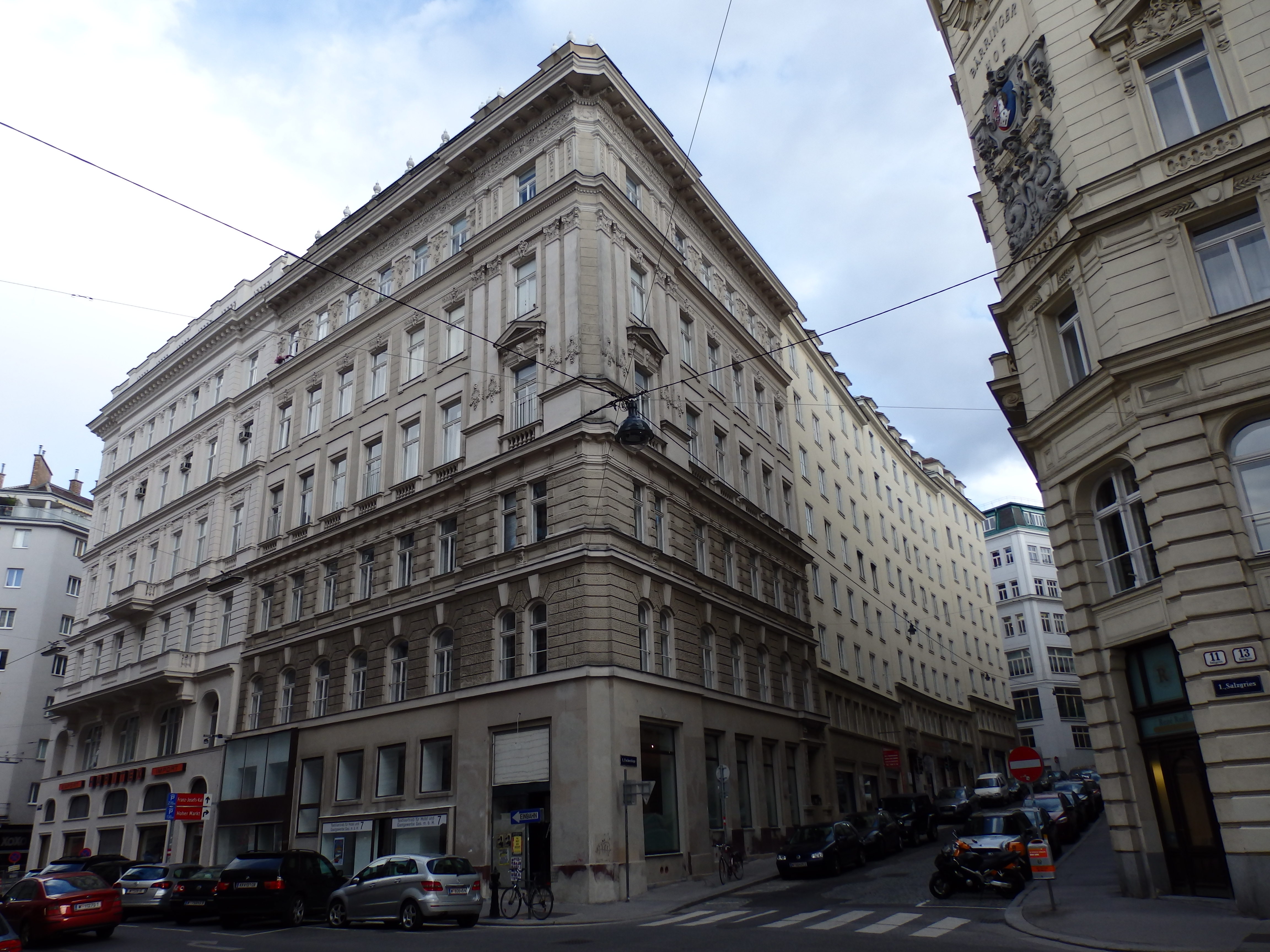 Wohnhaus (1892) von Ferdinand Dehm und Franz Olbricht, Fischerstiege 10, Wien-Innere Stadt